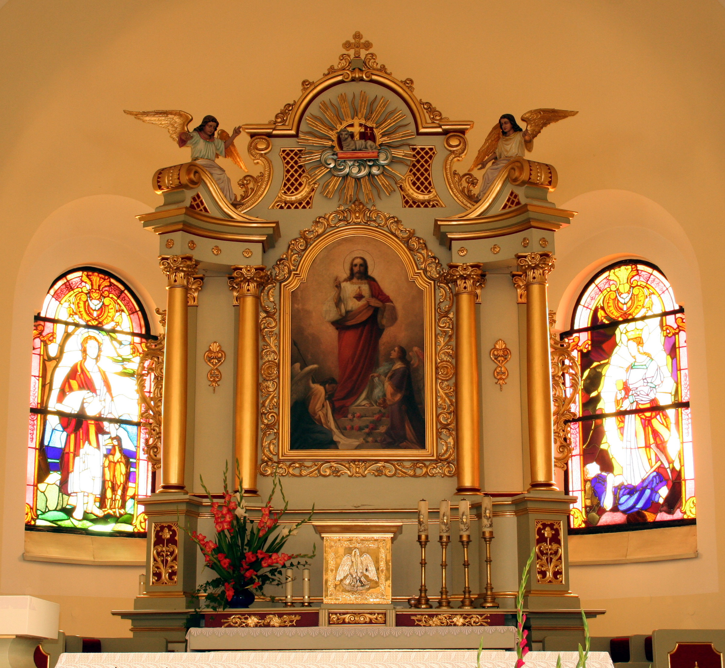 ołtarz główny w Kościele Najświętszego Serca Pana Jezusa w Rybniku Niedobczycach